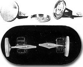 Sichergestellte Manschettenknöpfe (hohl) von Rudolf Abel